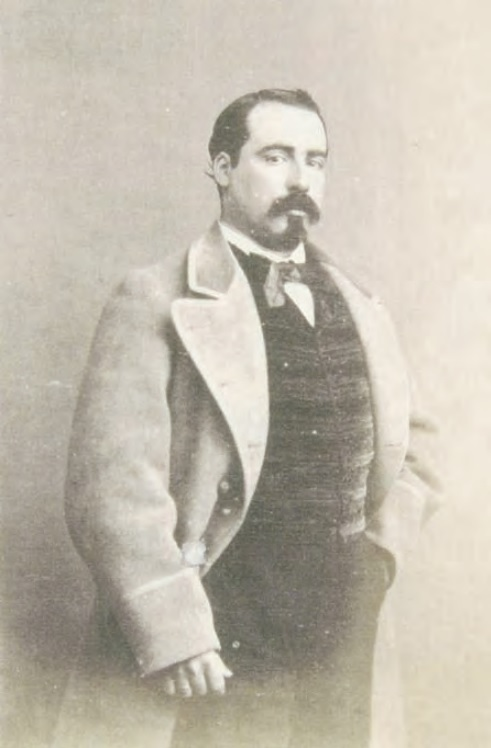 Isidoro Lozano, fotografía de J. Laurent. Museo de Historia de Madrid